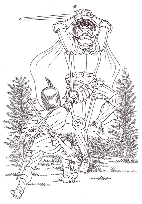 איור של דניאל פלנט מספרו "החייל"